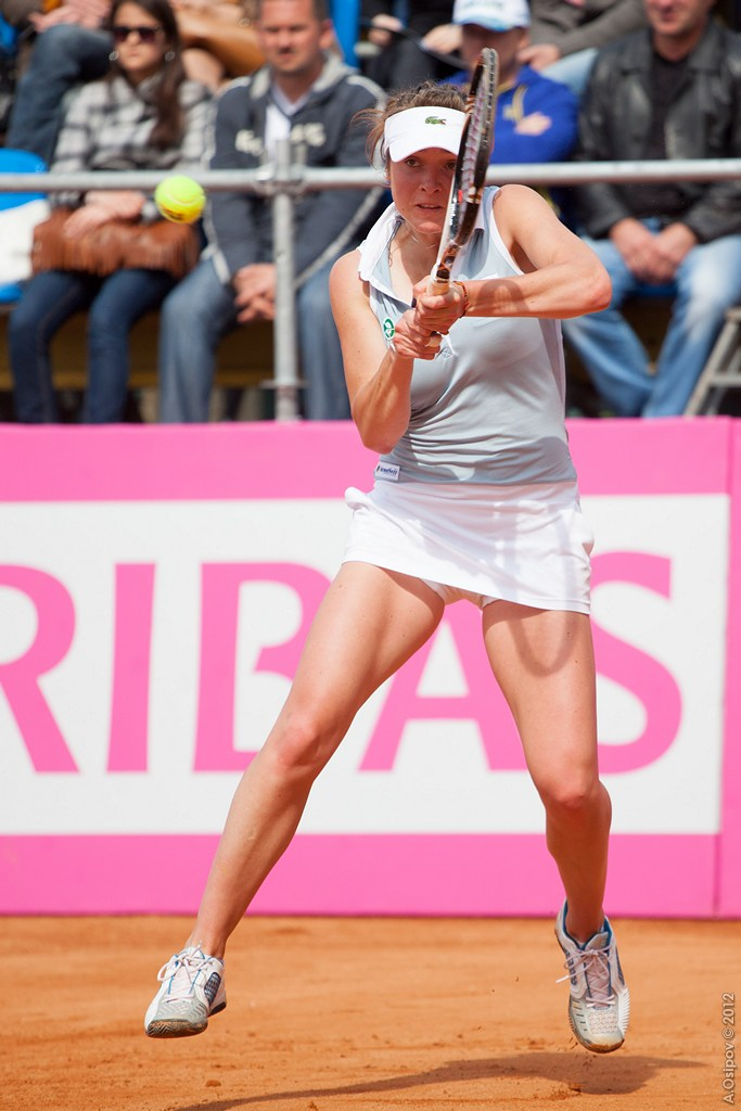 Elina Svitolina